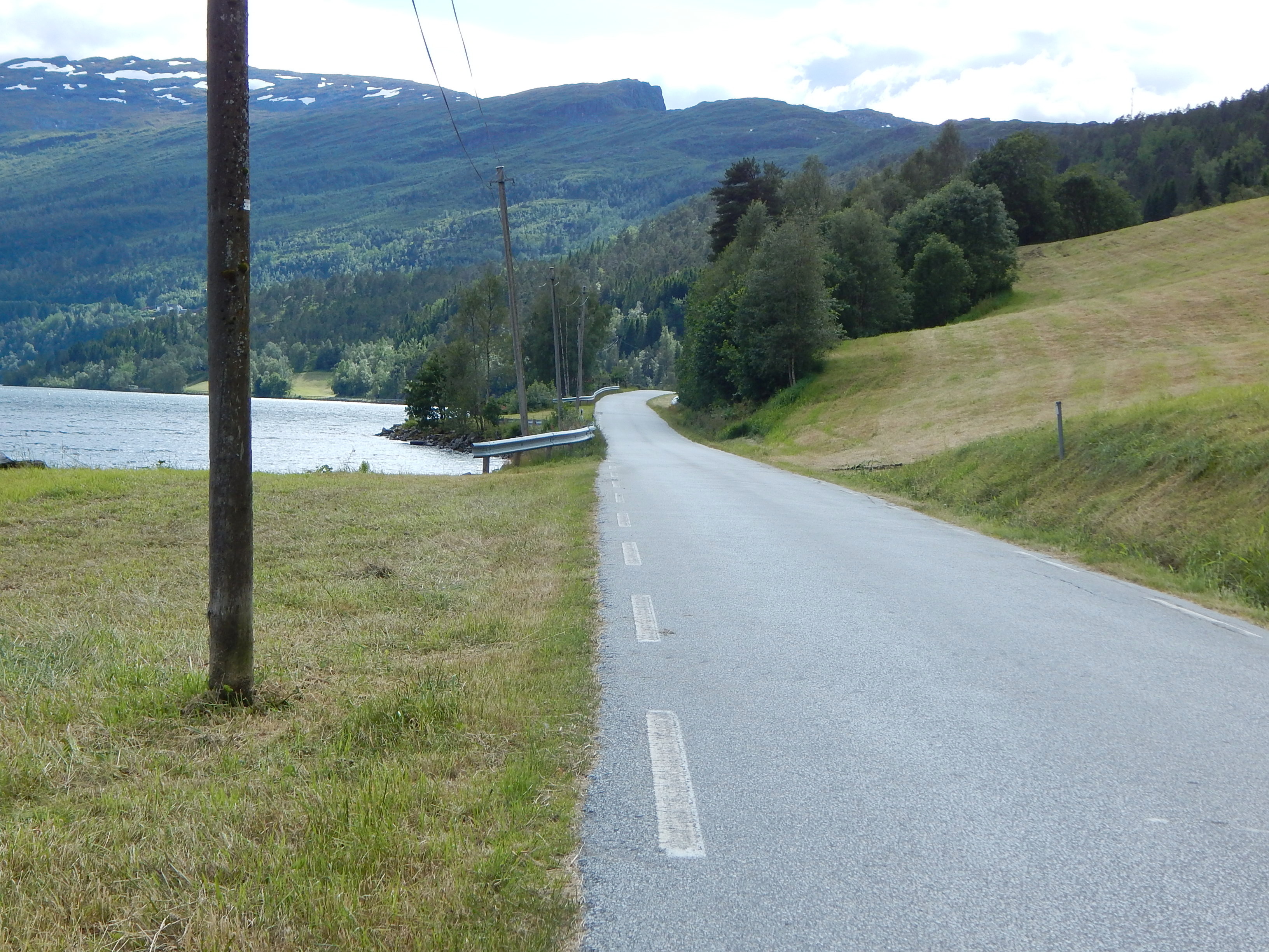 Fylkesvei 5683 (tidl. 483) følger for en stor del Haukedalsvatnets nordre bredd.